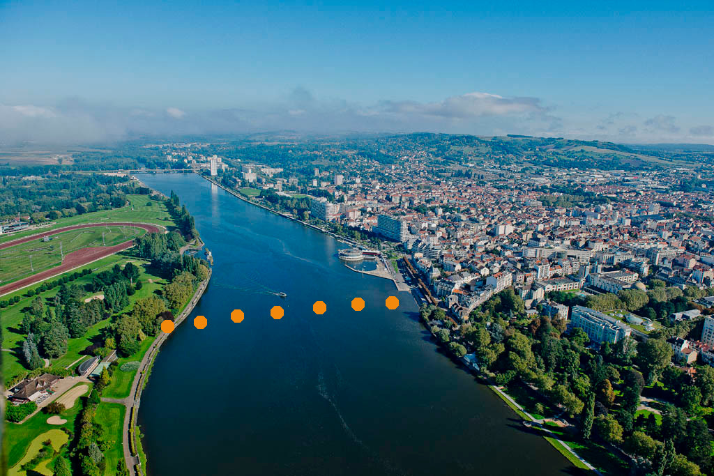 Marquage de l'emplacement supposé du pont romain qui traversait à l'Allier à Vichy Photo originale File:Vichy aujourd hui.jpg de Stéphane Balanger ((CC BY-SA 4.0 , 2013)